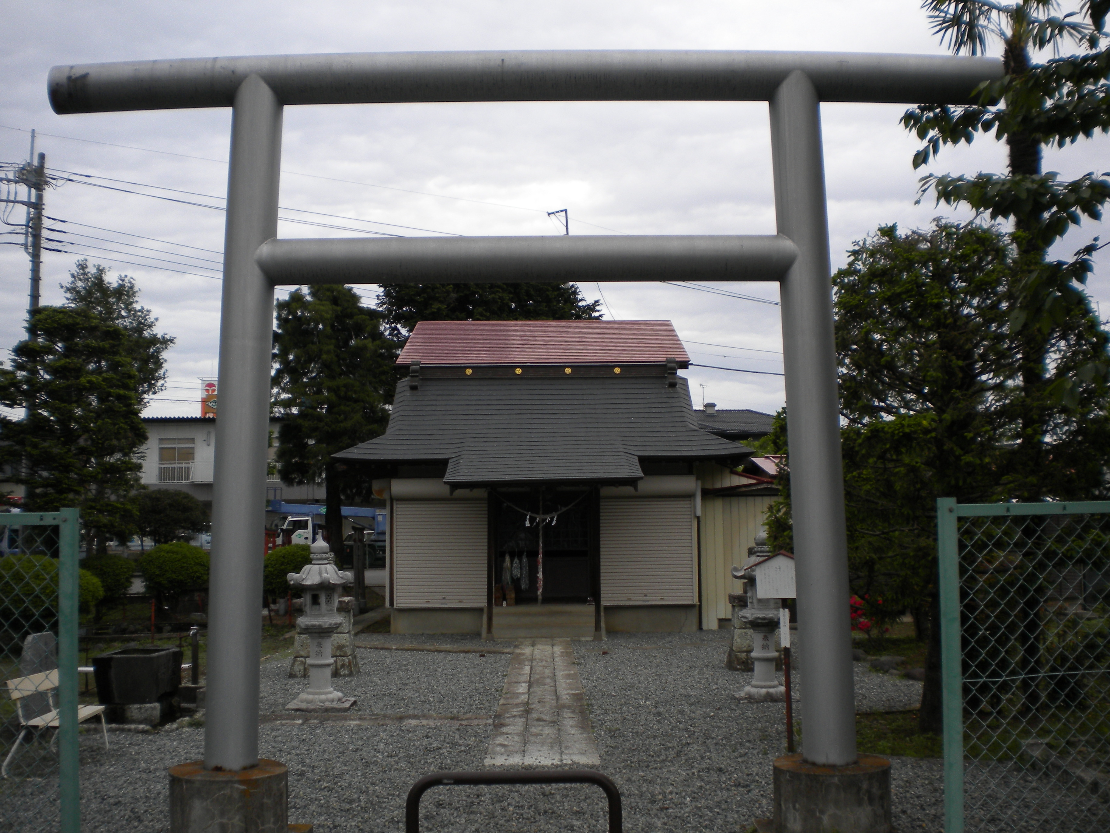 滝尾神社 栃木県宇都宮市滝谷町